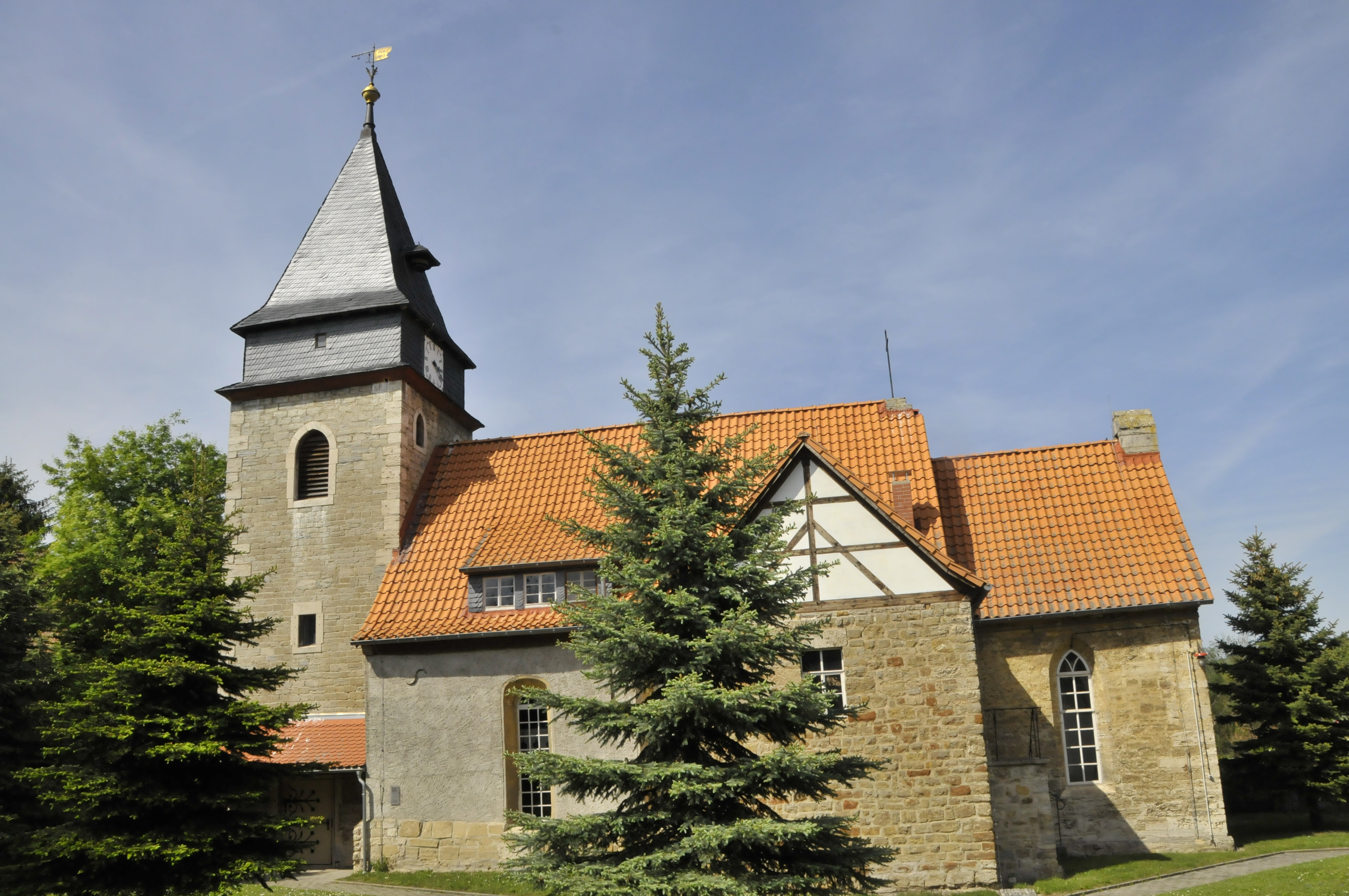 Tottleben, Kirche